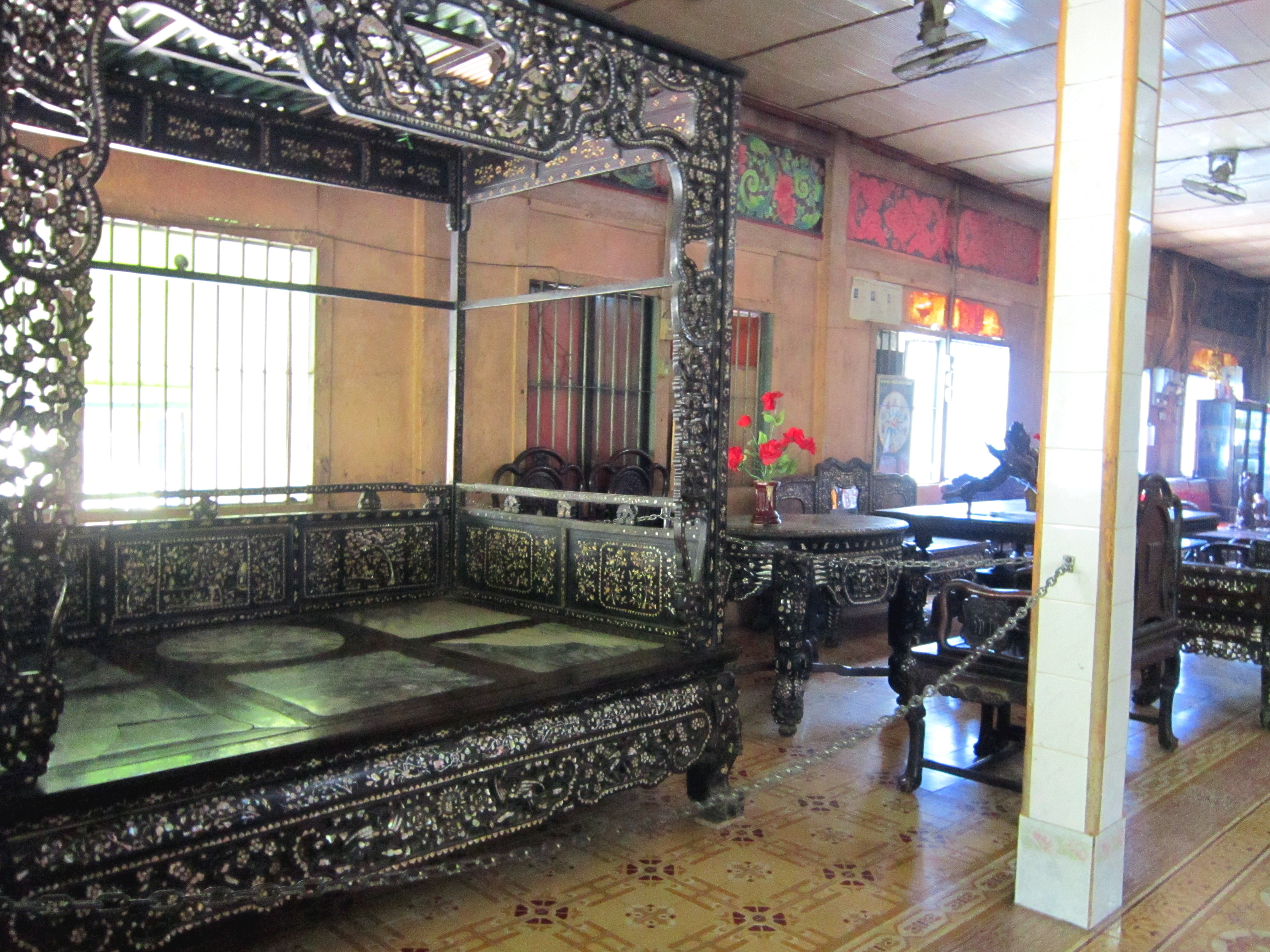 Số đồ gỗ được chùa Sa Lôn (Sóc Trăng, Việt Nam) mua l.ại trong phần gia sản của “công tử Bạc Liêu” (Trần Trinh Huy) năm 1947